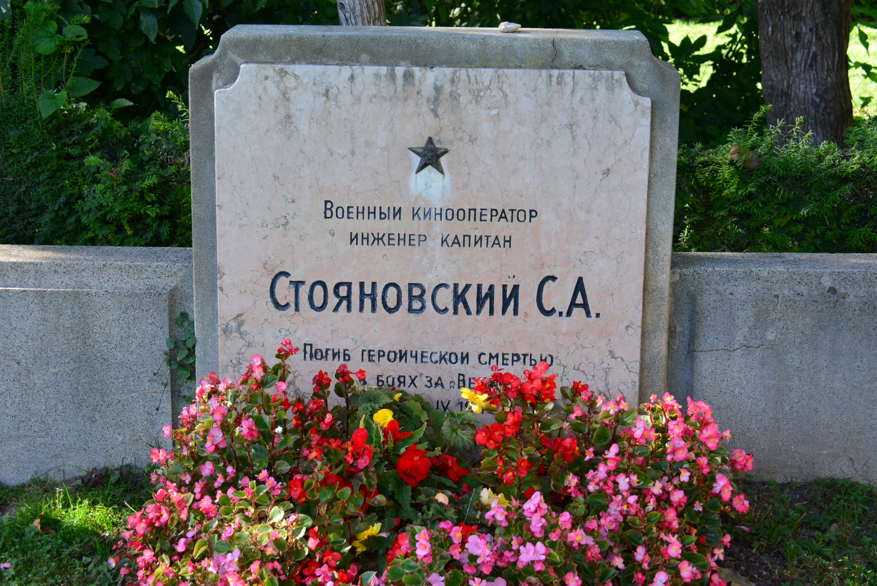 Grabstein auf dem russischen Heldenfriedhof auf dem Zentralfriedhof in Wien